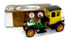 Bianchi 1906 a escala 1:43.